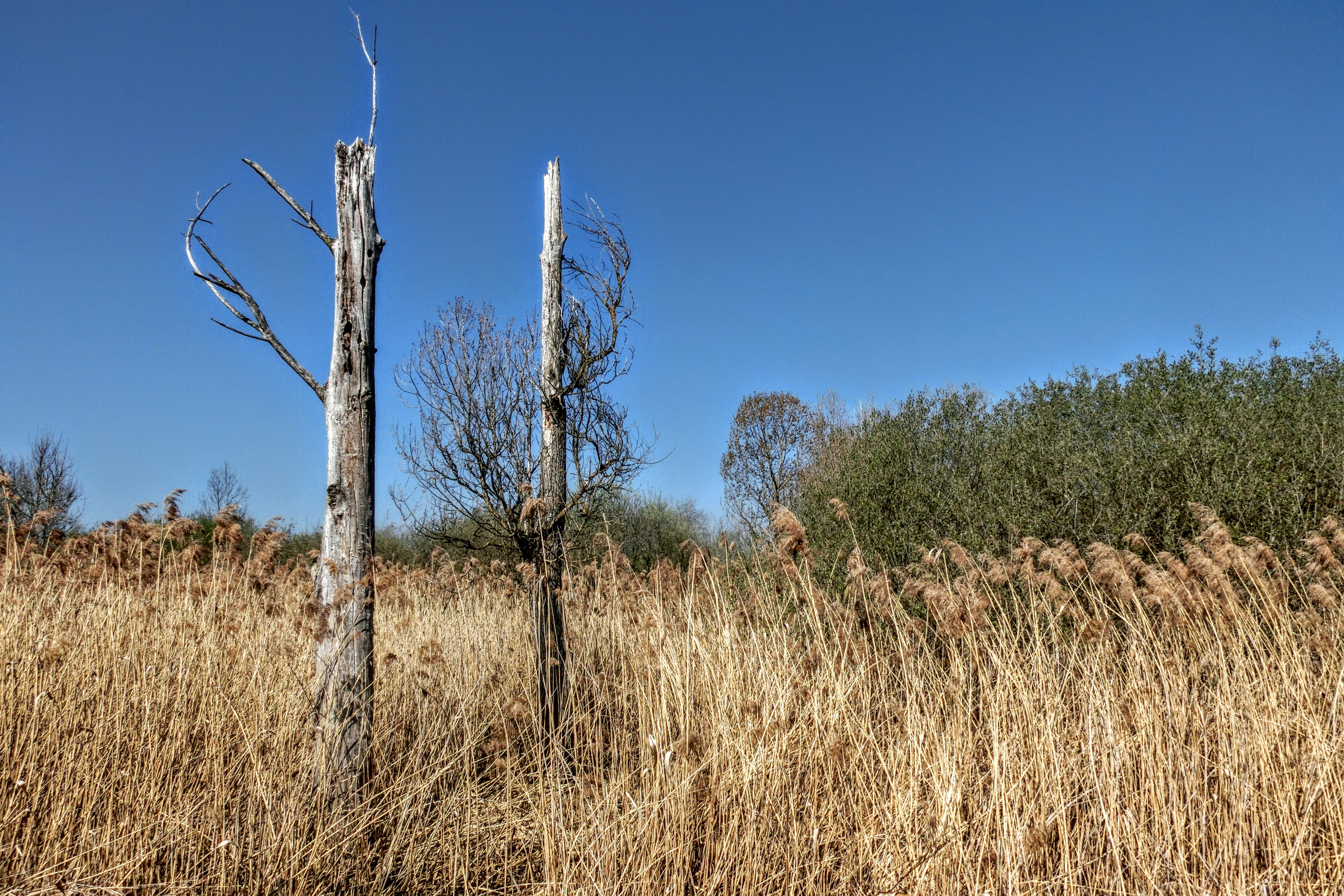 Deutschland (D) - Baden-Württemberg (BW) - Landkreis Konstanz (KN) - Mühlhausen-Ehingen: Naturschutzgebiet "Ehinger Ried"